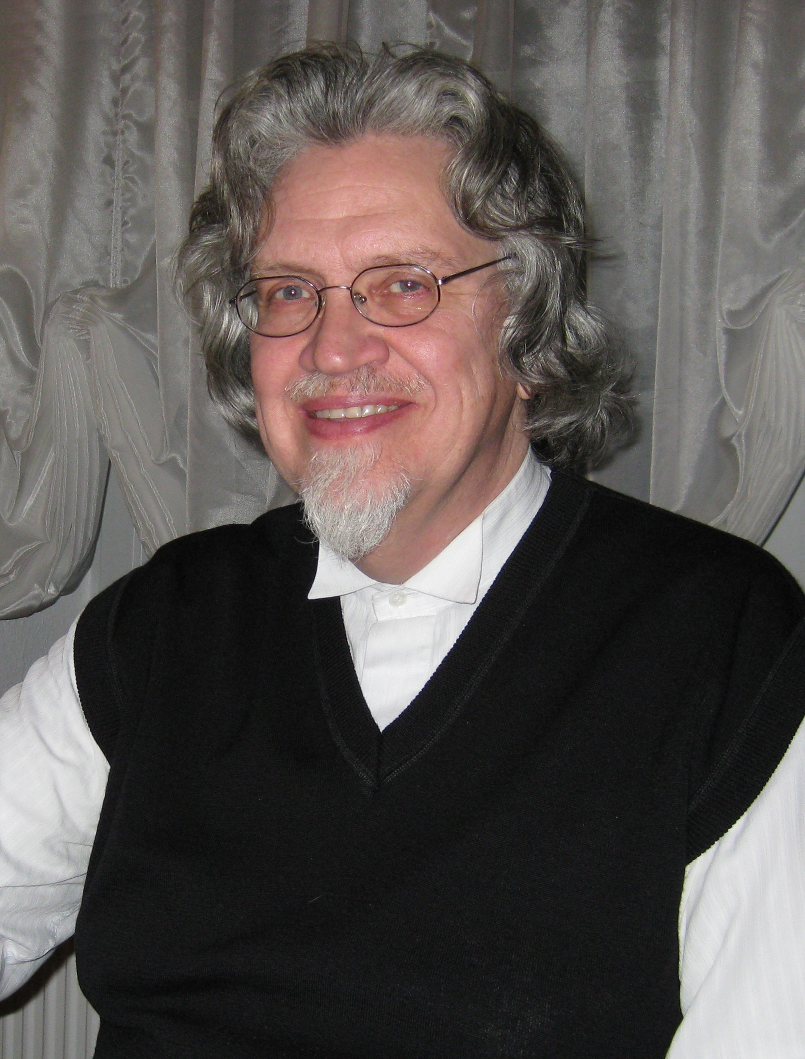 Pastor Dr. theol. Jan Marius Jacob Lamge van Ravenswaay